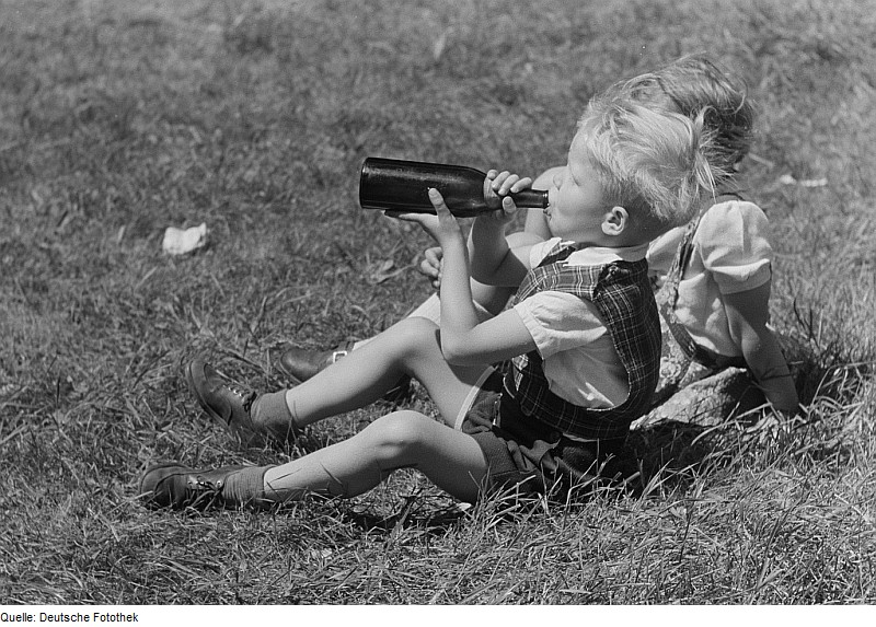 Original image description from the Deutsche Fotothek Zwei Kinder